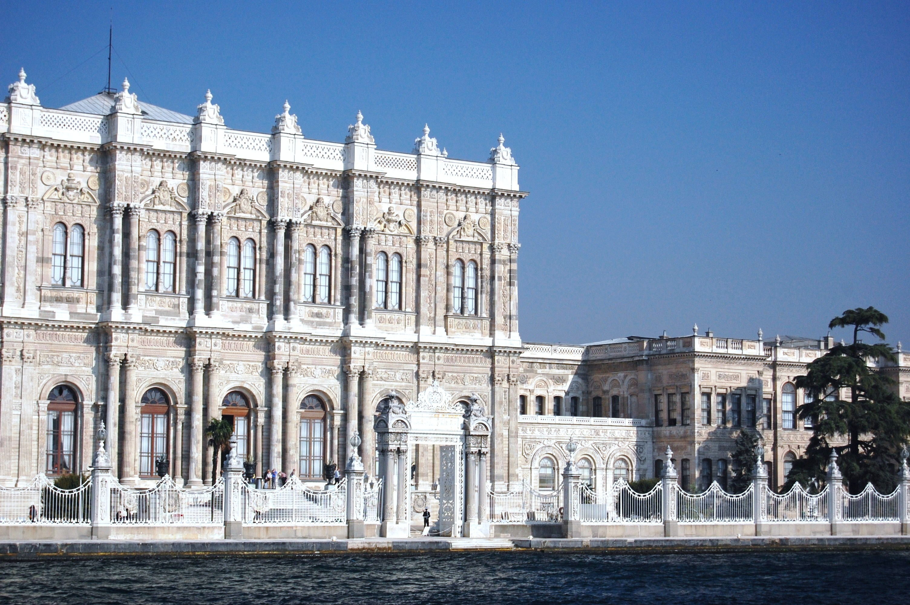 dolmabahce